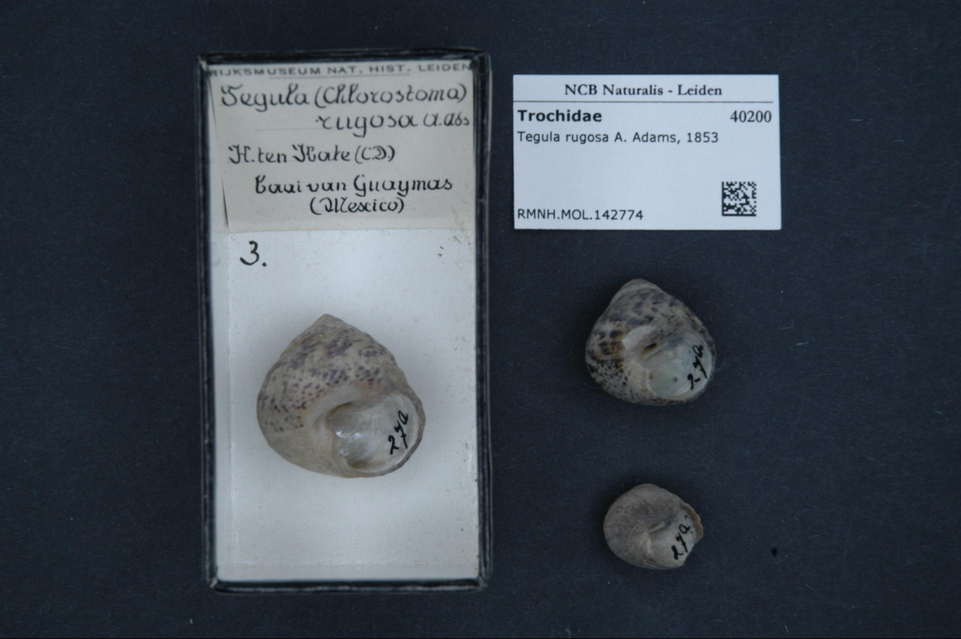 Tegula rugosa (Adams, 1851)